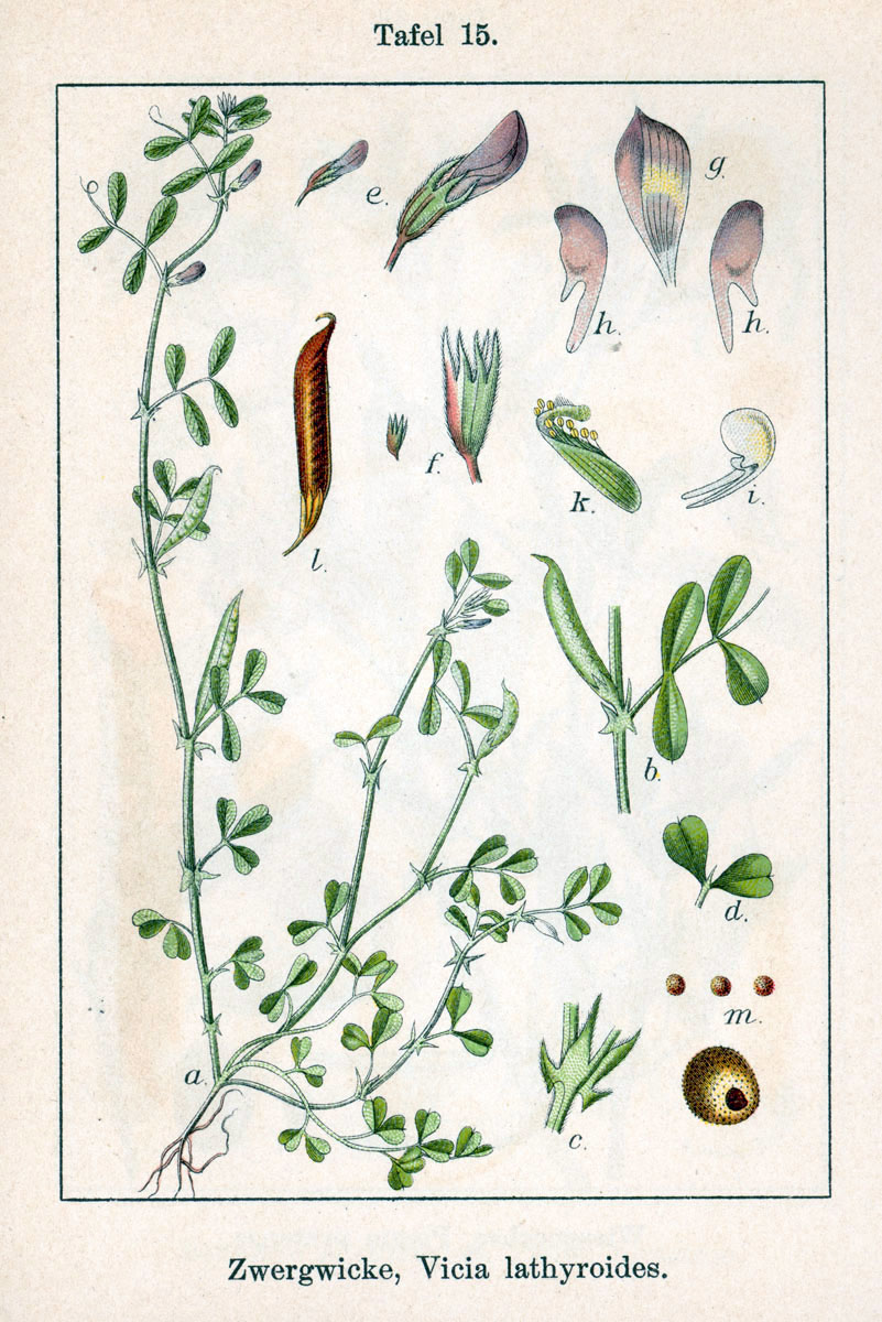 Vicia lathyroides L. Original Description Zwergwicke, Vicia lathyroides